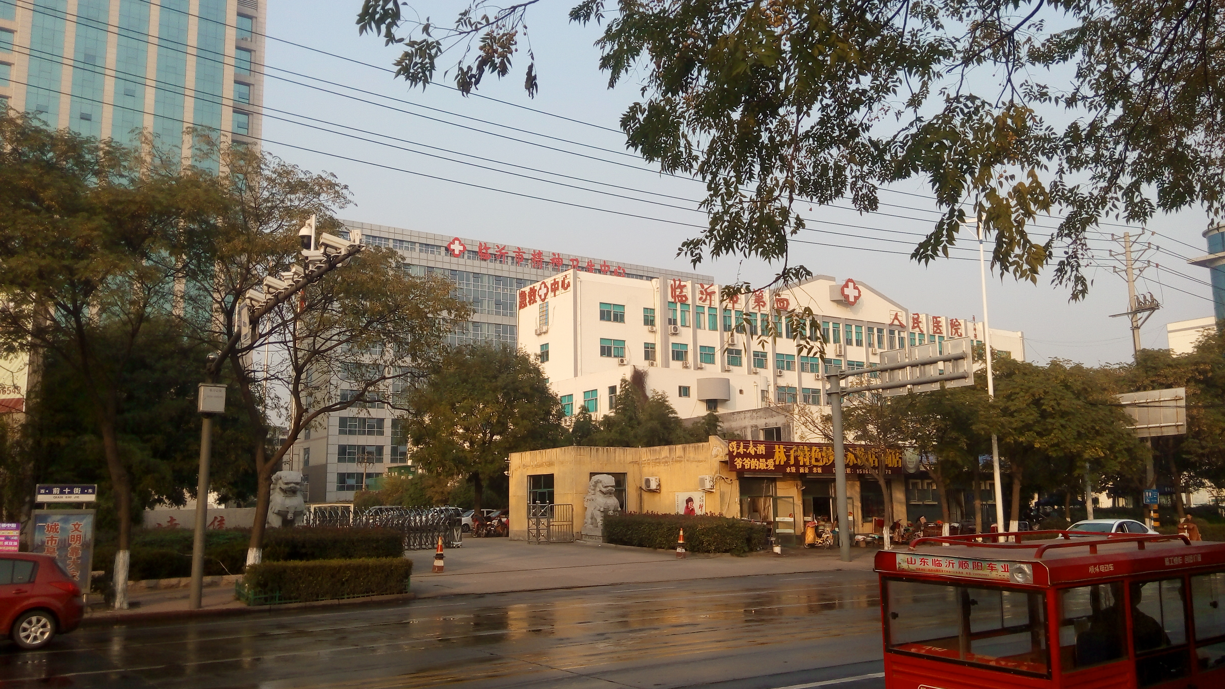 临沂市第四人民医院外景 The Fourth Hospital of Linyi (Linyi Mental Hospital)